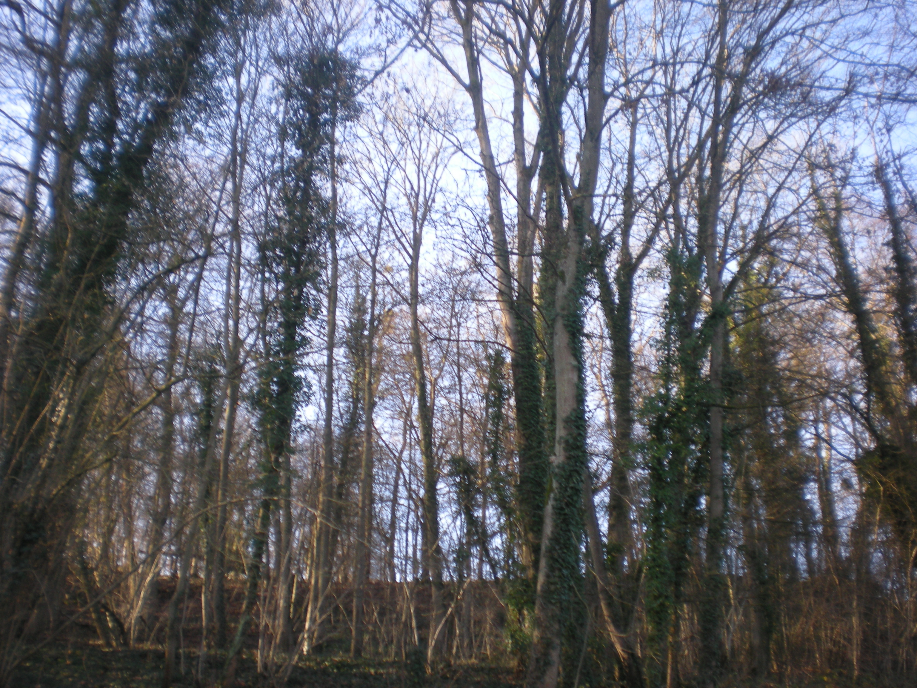 Bois à Lierval (Neuilly-sous-Clermont)